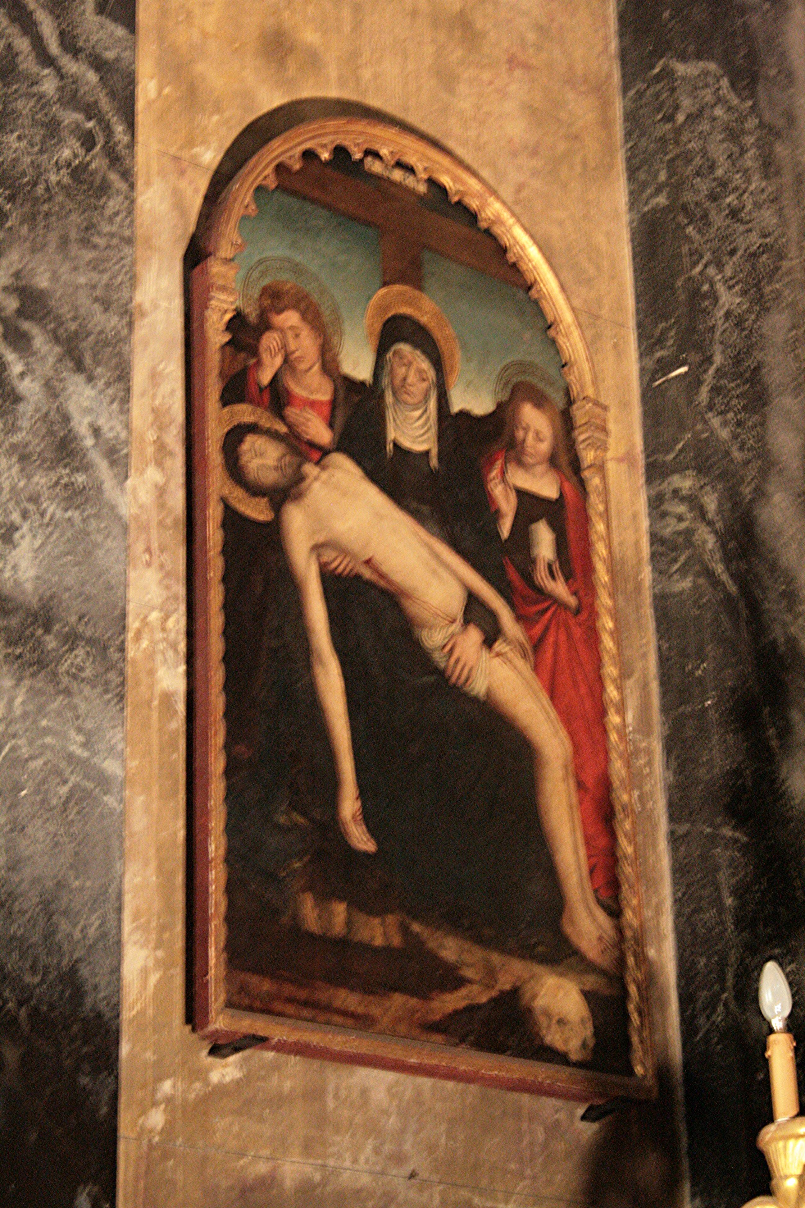 Pieta de l'église Saint-Martin-Saint-Augustin par Louis Brea, fin XVe siècle. Nice, France, Alpes-Maritimes.